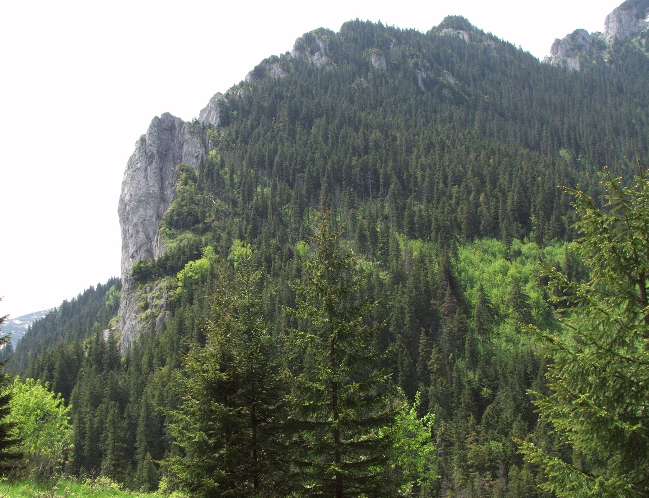 Raptawicka Turnia (Dolina Kościeliska)